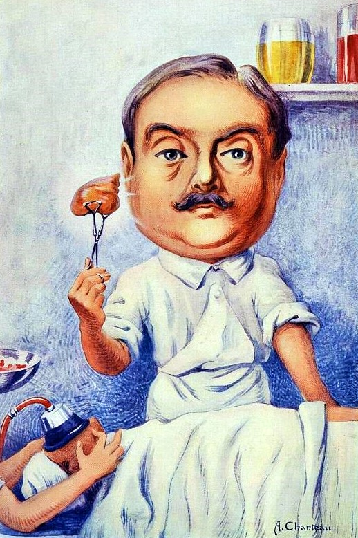 Docteur Proust (caricature par A. Chanteau) Chanteclair . - 1922. - 17e année Page d'accueil de Medic@